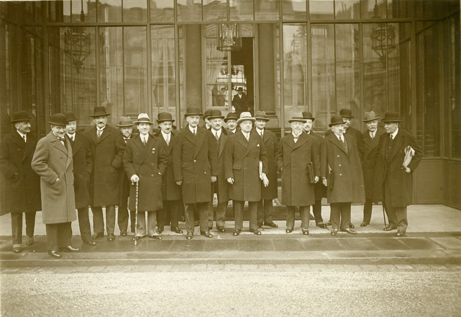 Le gouvernement André Tardieu, photographie de Georges Devred, agence Rol, 1931. Inscription au verso : Paris 14.1.1930. Important Conseil des Ministres à l'Élysée. Monsieur Tardieu président du conseil, photographié au milieu de ses collaborateurs à la sortie du conseil.